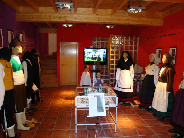 Esposición de traxes del Grupu Folclóricu "Blimea"